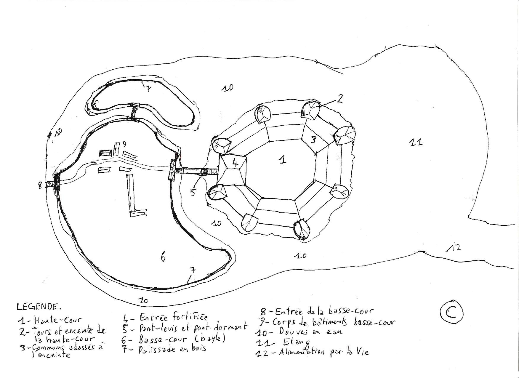 Plan du château de Commequiers tel qu'il devait etre au début du XVIe siècle.